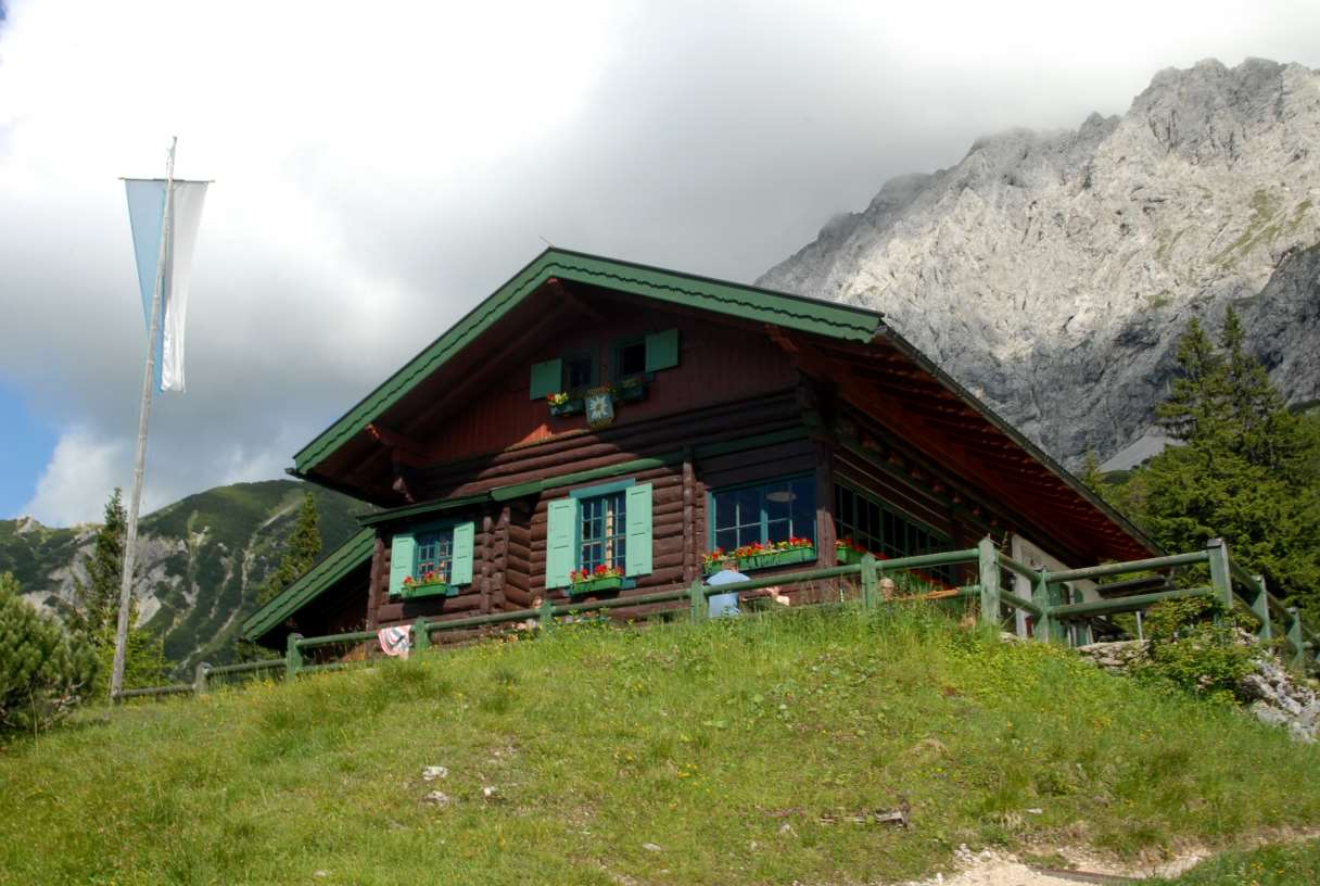 Karwendel, Hochlandhütte / alps , hutt